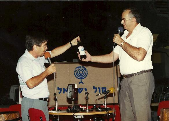 התוכנית ה-400 של מחפשים את המטמון נערכה בחצר היקב בראשון לציון. בתום התוכנית מסר זאב ענר (משמאל), עורך התוכנית ומחבר כתב החידה, לראש העיר מאיר ניצן (שהשתתף כמטמונאי כמה שנים קודם לכן), בקבוק יין מיוחד שהיקב ביקבק לכבוד התוכנית